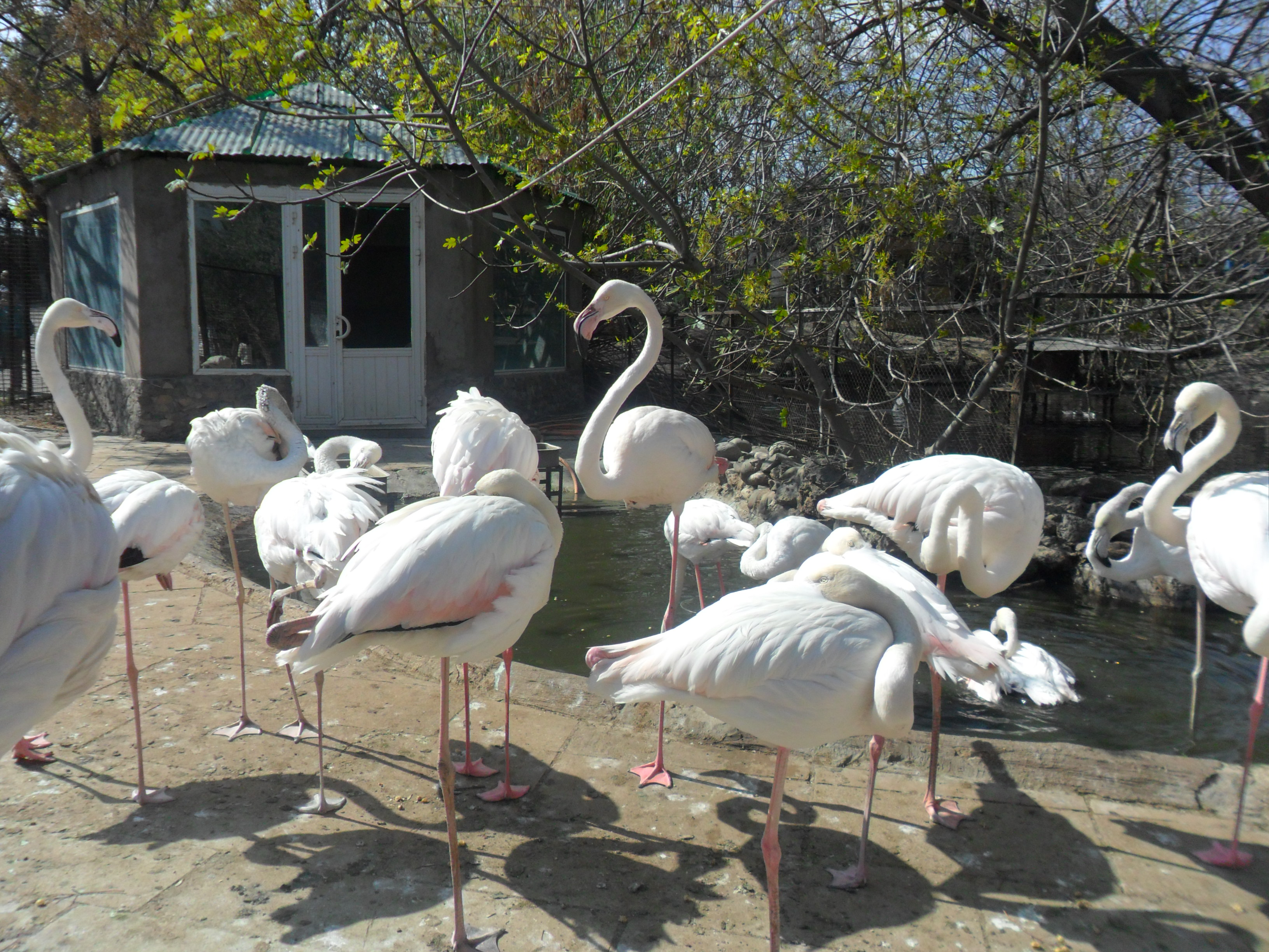 Bakı Zooloji Parkı